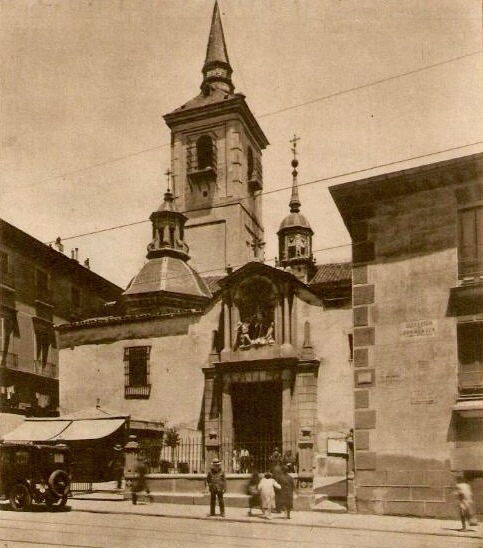 Fotografía de la desaparecida iglesia de San Sebastián en el primer cuarto del siglo XX.